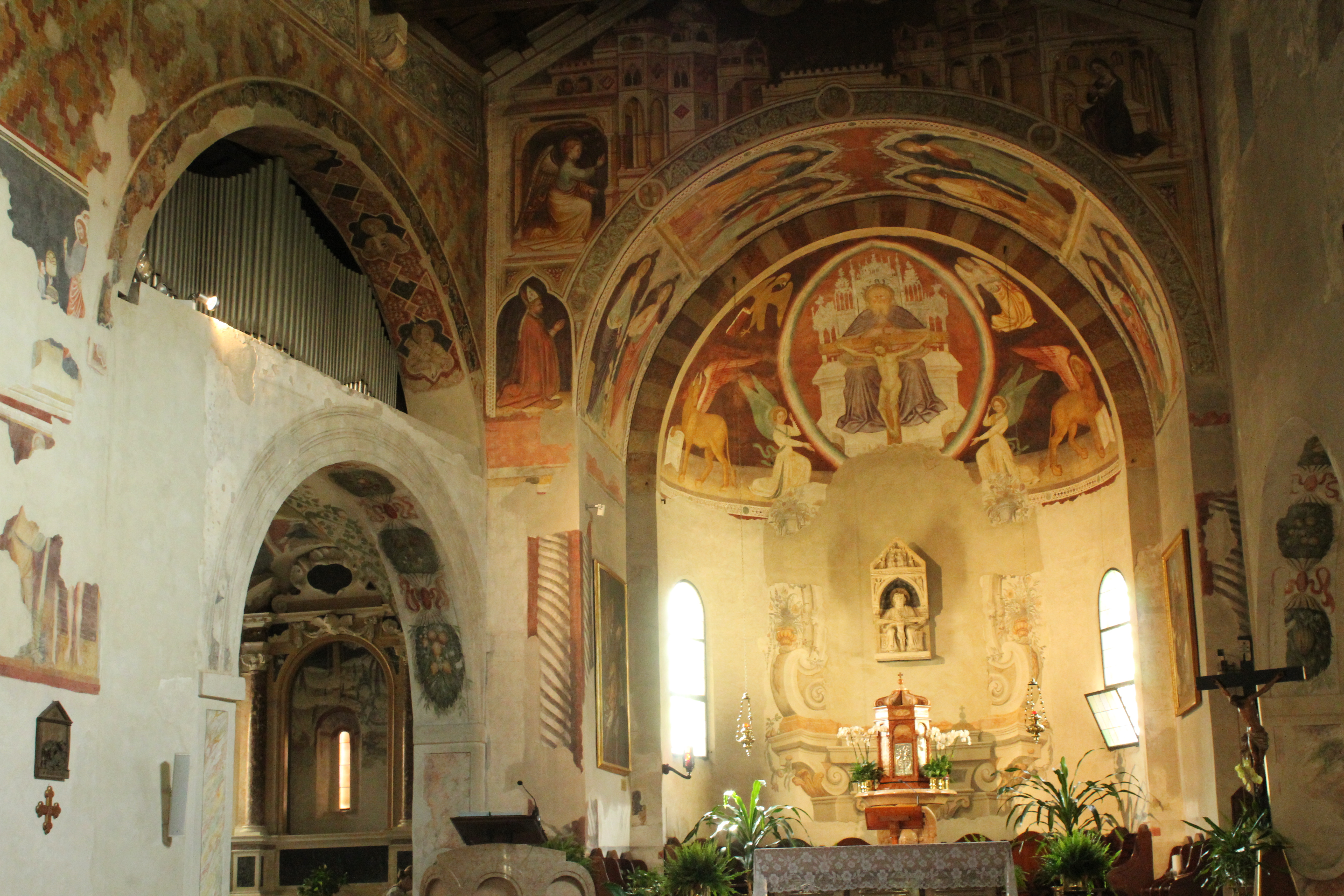 Chiesa della Santissima Trinità in Monte Oliveto a Verona. Presbiterio